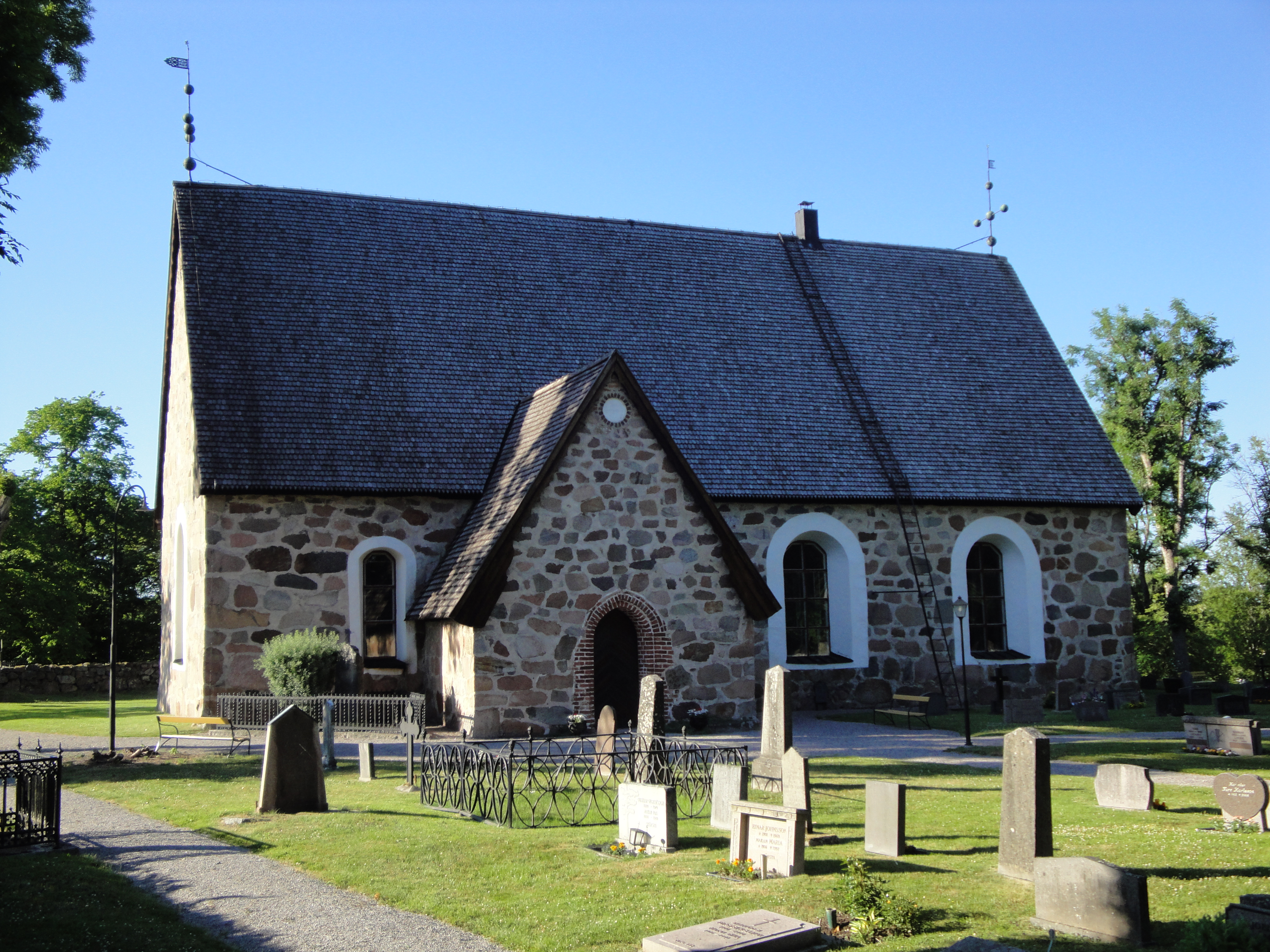 Edebo kyrka, Norrtälje kommun. Långhuset och kor samt vapenhuset i förgrunden.